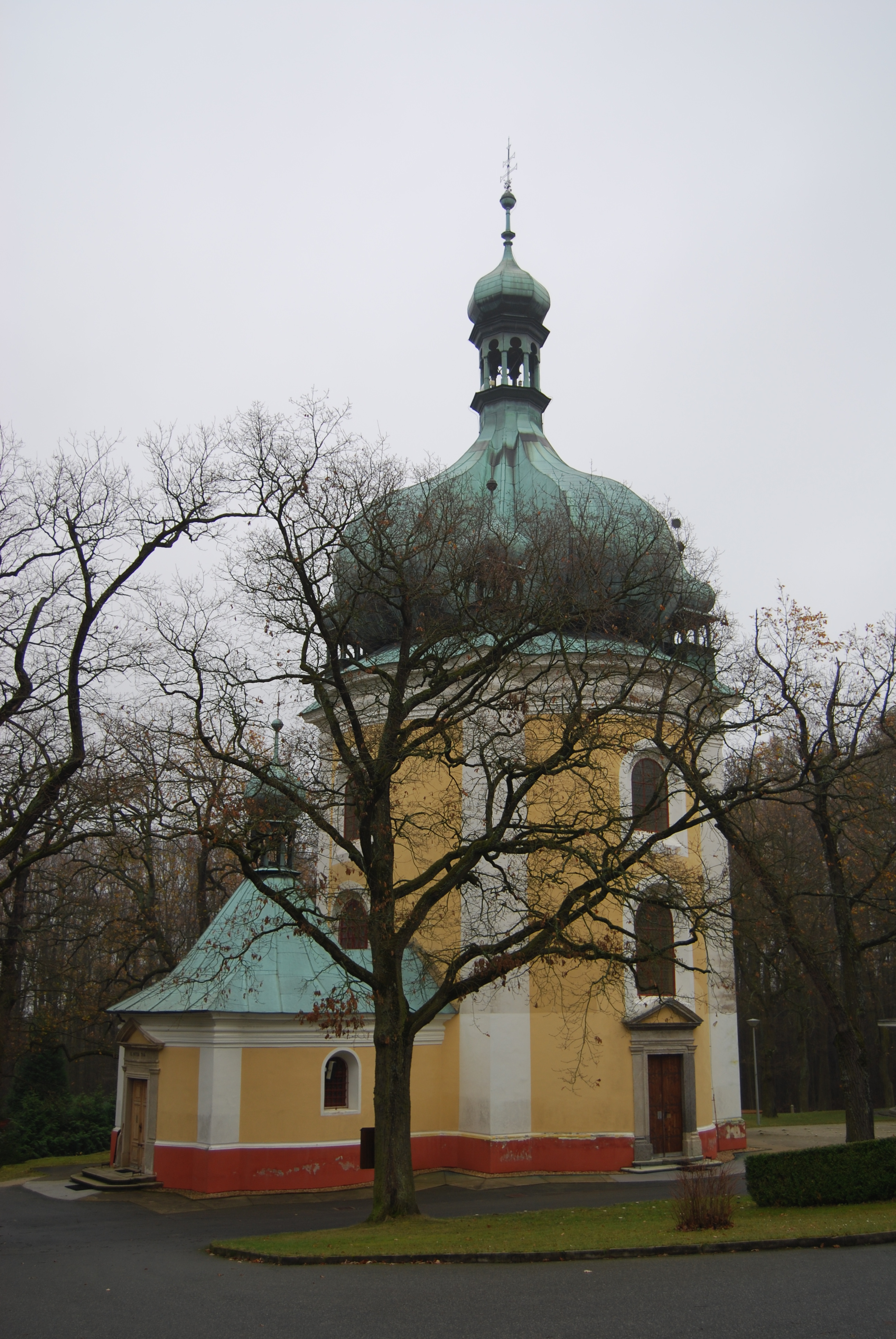 Pohled od zvonice na kostel Jména Panny Marie. Lomec - poutní místo u Netolic, v katastru vesnice Nestanice v okrese Strakonice. Česká republika. - Google Maps - Google Earth